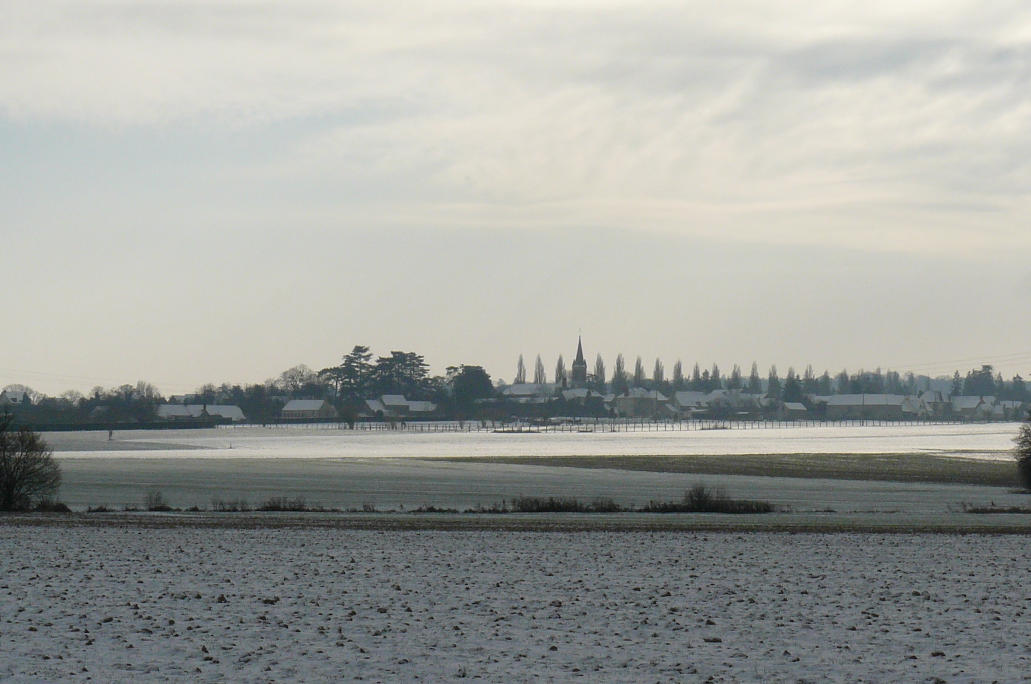 Vrigny (61) sous la neige